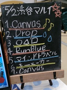 amiinaセトリボード(20150502(2))